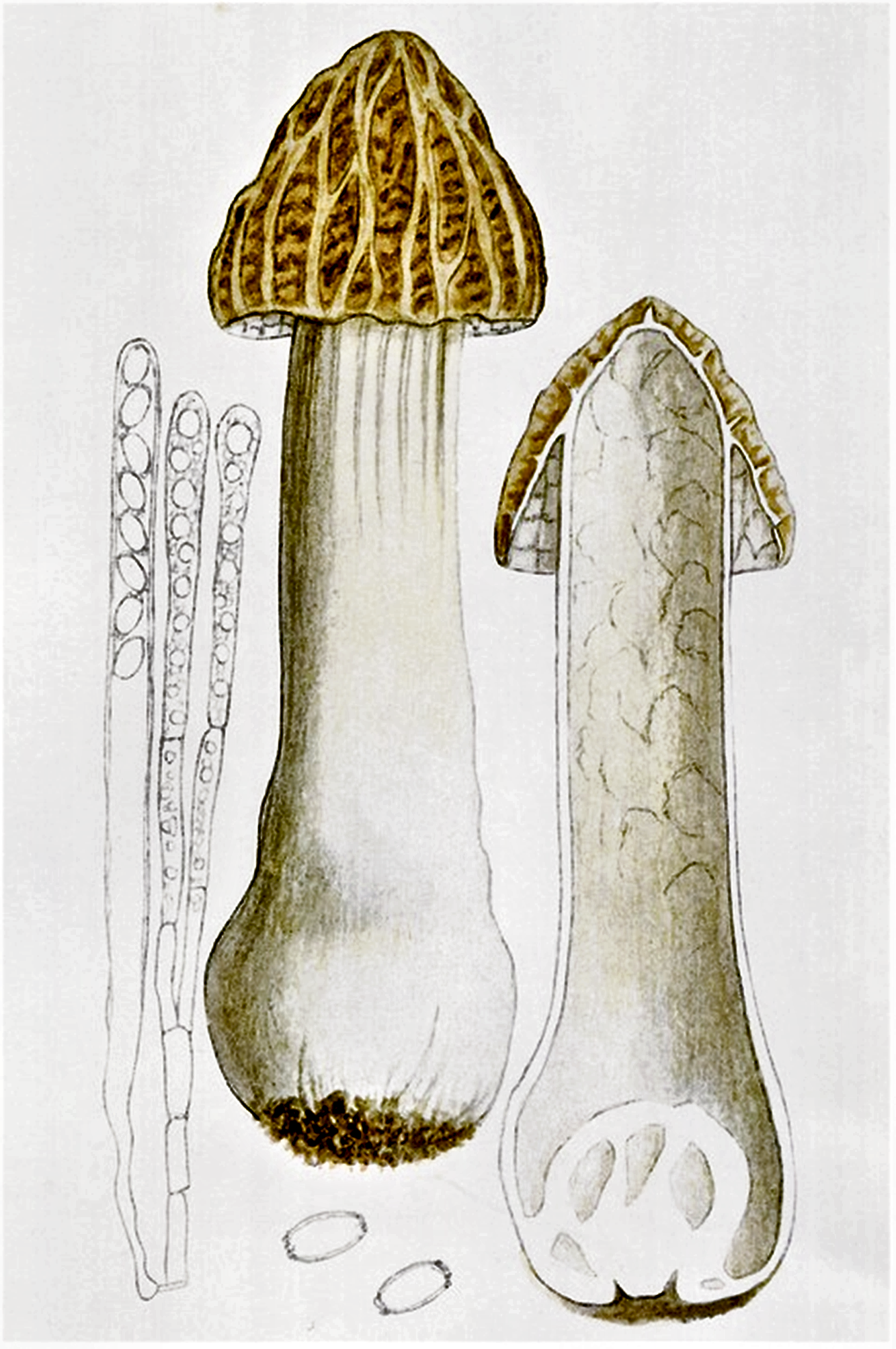 Morchella gigas, heute: Morchella semilibera sin. Mitrophora semilibra